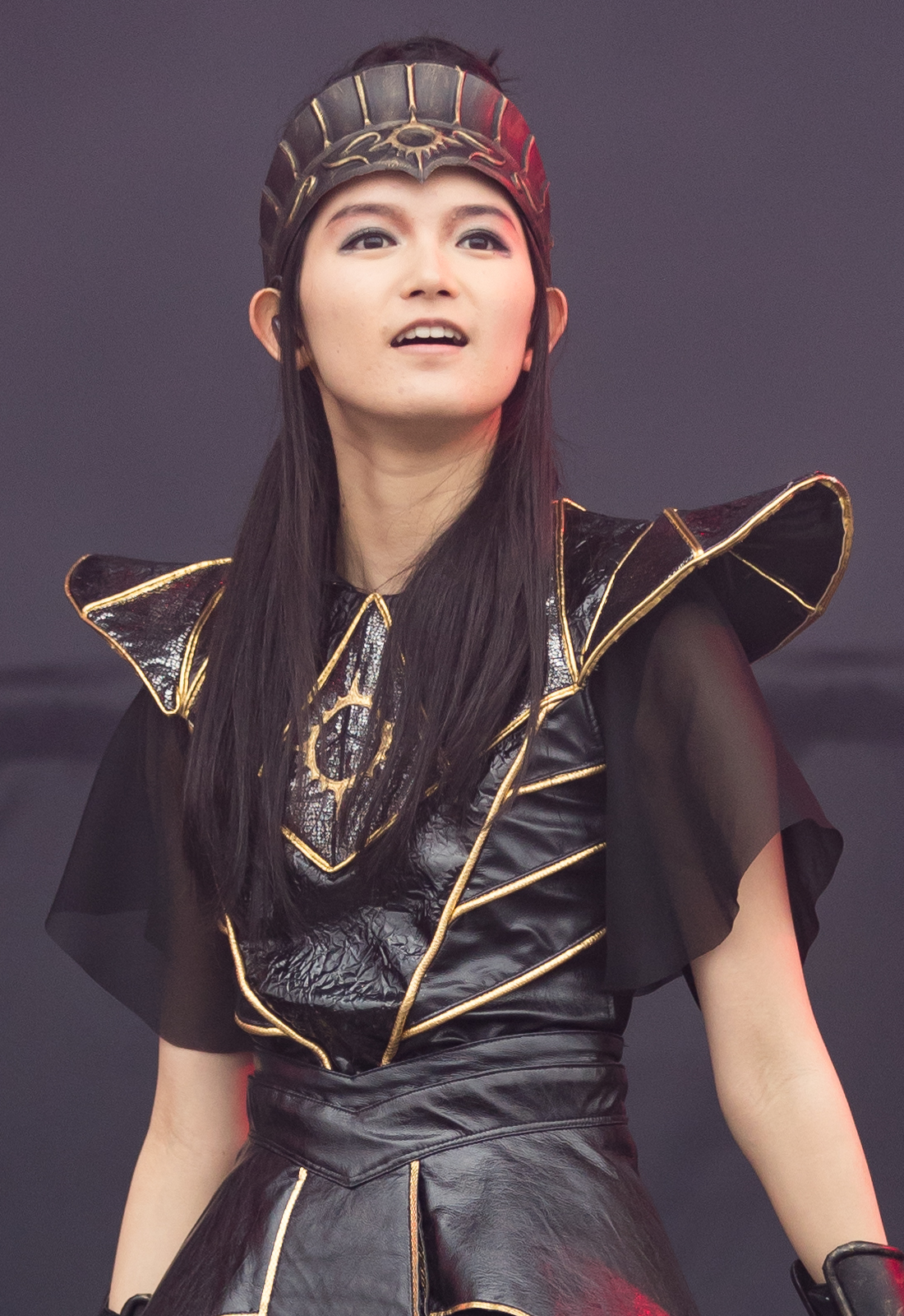 Babymetal @ Rock am Ring 2018